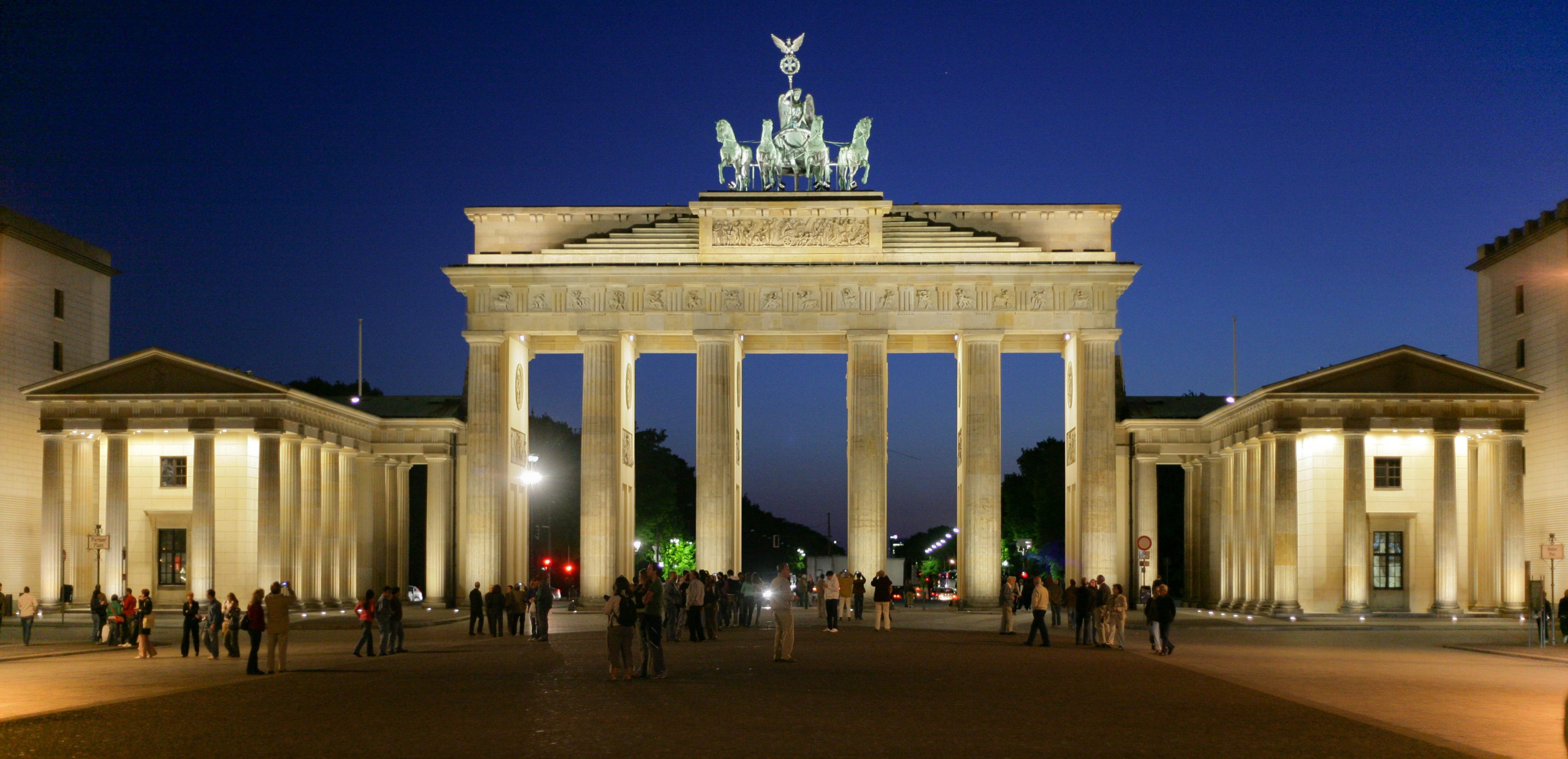 Brandenburger Tor by night. Berlin, Germany